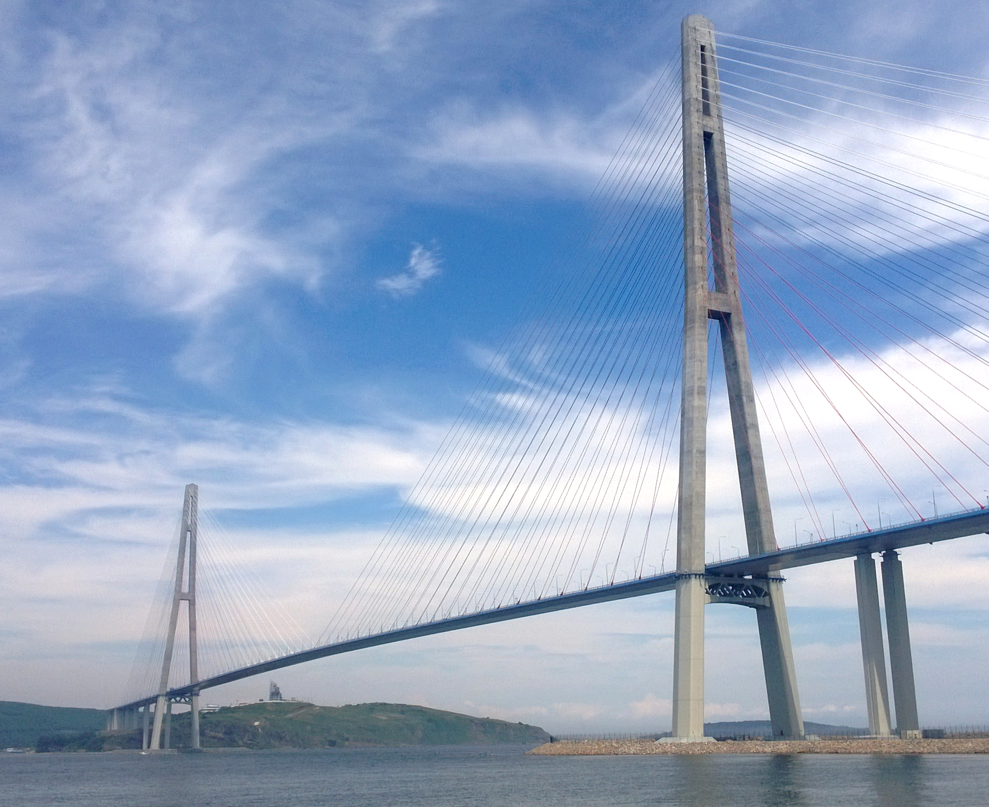 Frunzenskiy rayon, Vladivostok, Primorsky Krai, Russia